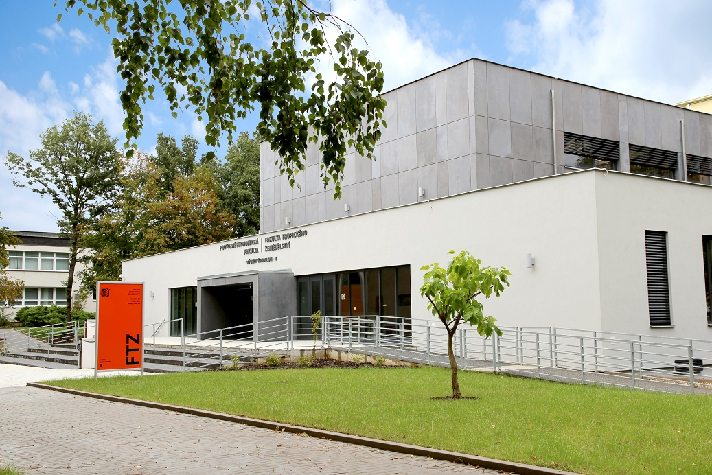 FTZ sídlí v nově postaveném pavilonu T